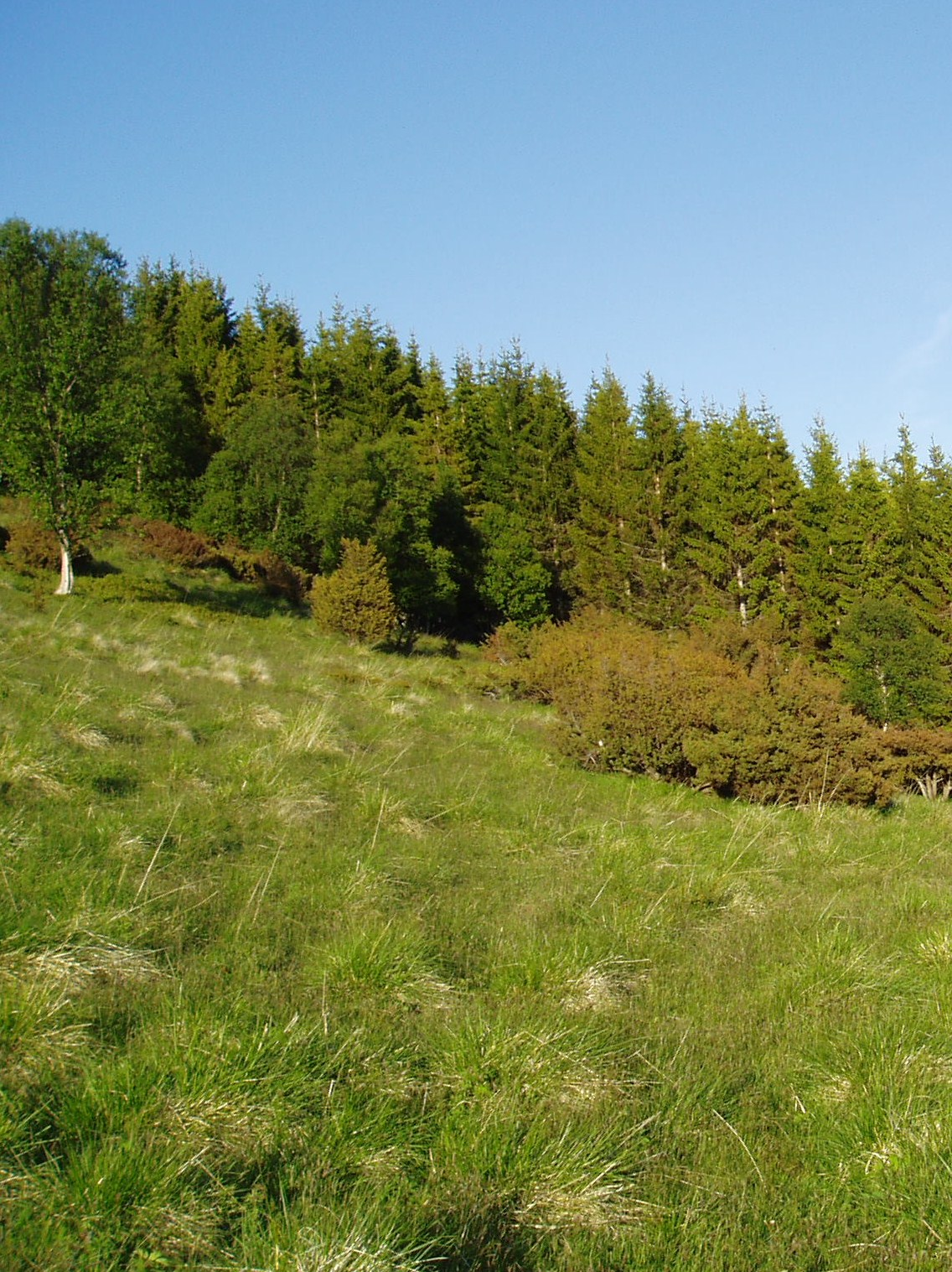 Dyrka granskog og kulturbeitelandskap. Raudhammaren, Borkenes, Kvæfjord.